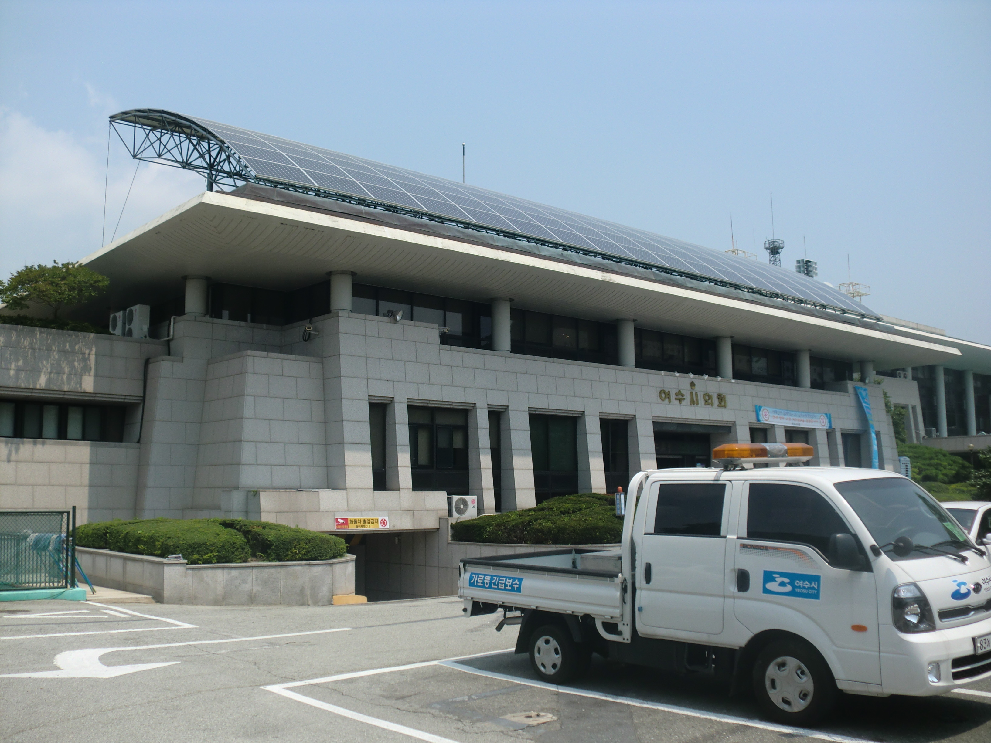 여수시청 여서청사 여수시의회